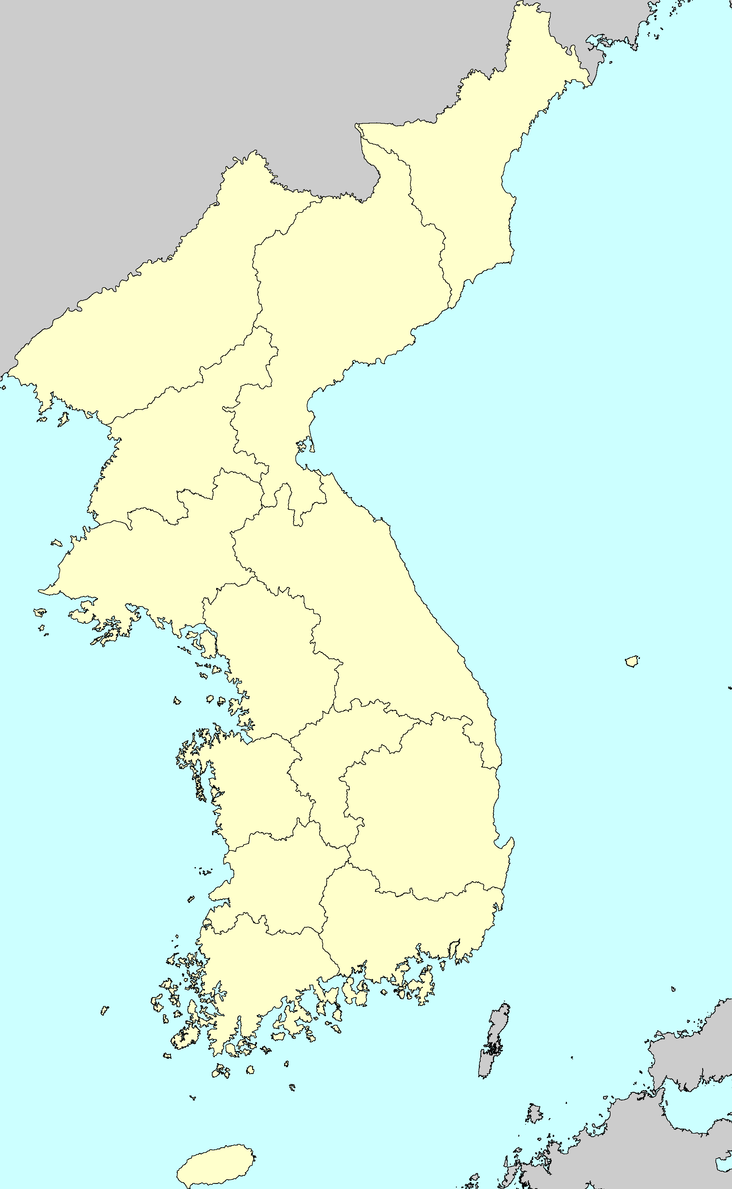 팔도를 대체하기 위해 새로 설치한 행정구역인 십삼도